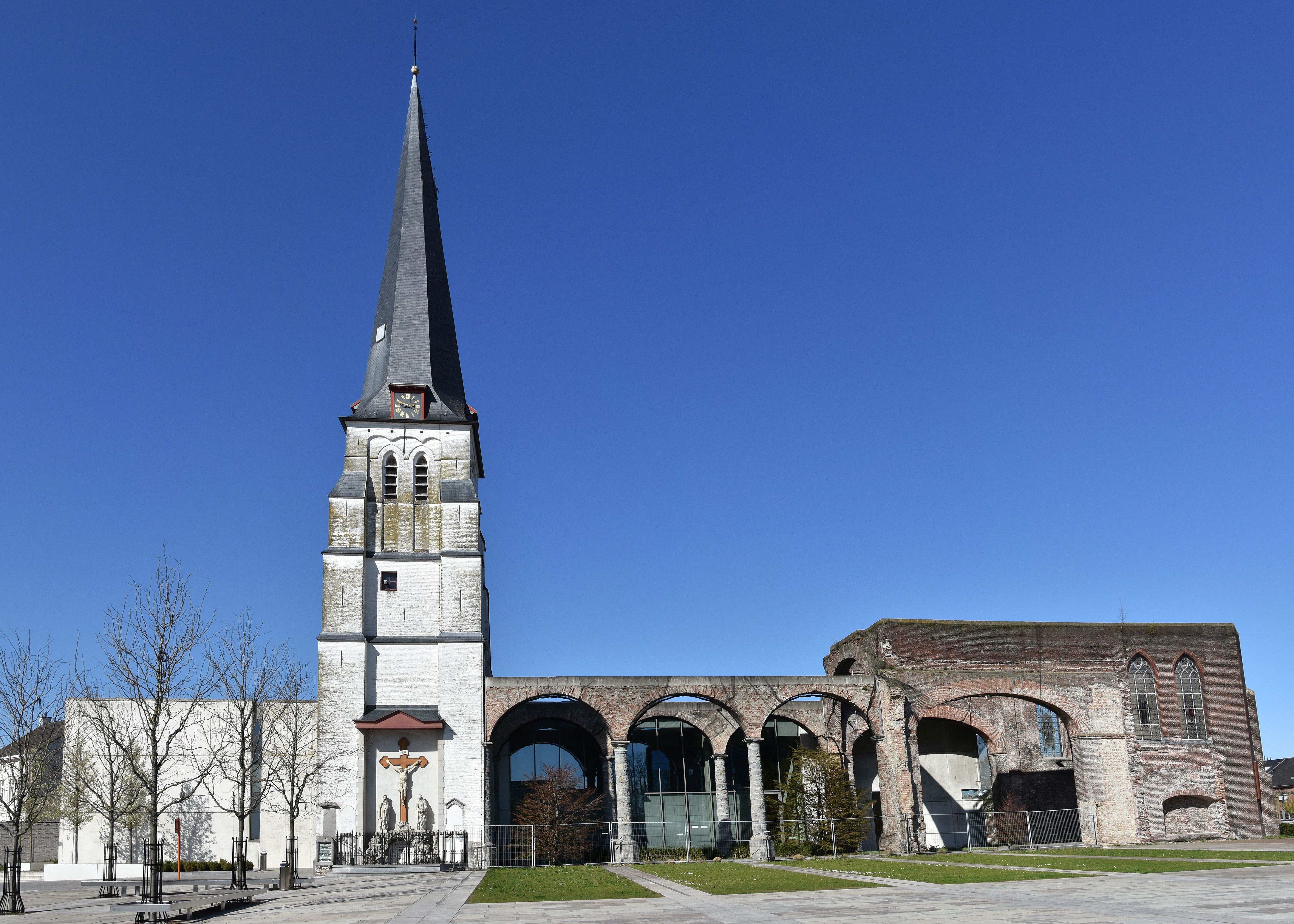 Waarschoot Sint-Ghislenuskerk erfgoed 33247 24-03-2019 14-46-021